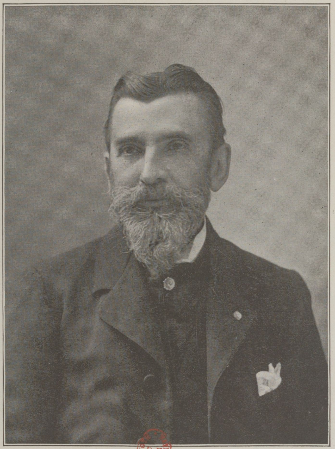 photographie du compositeur Georges Pfeiffer dans "La Marmite en 1900"